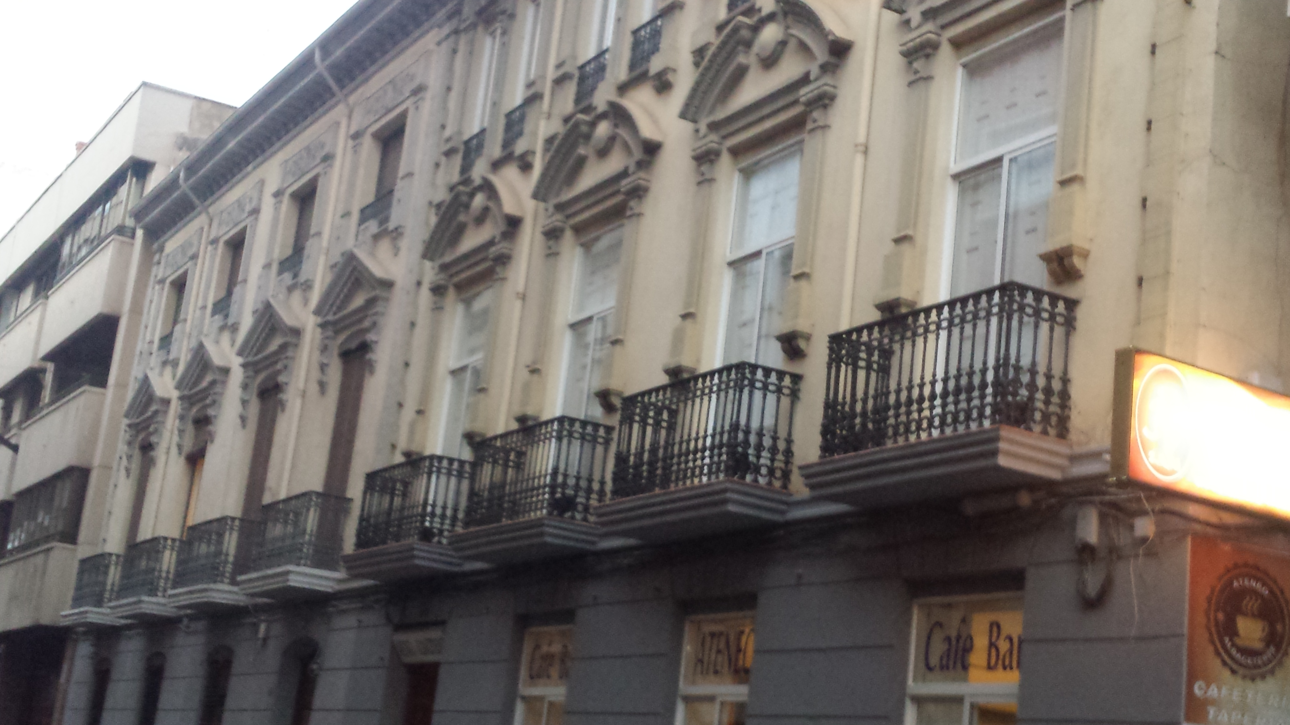 Ateneo